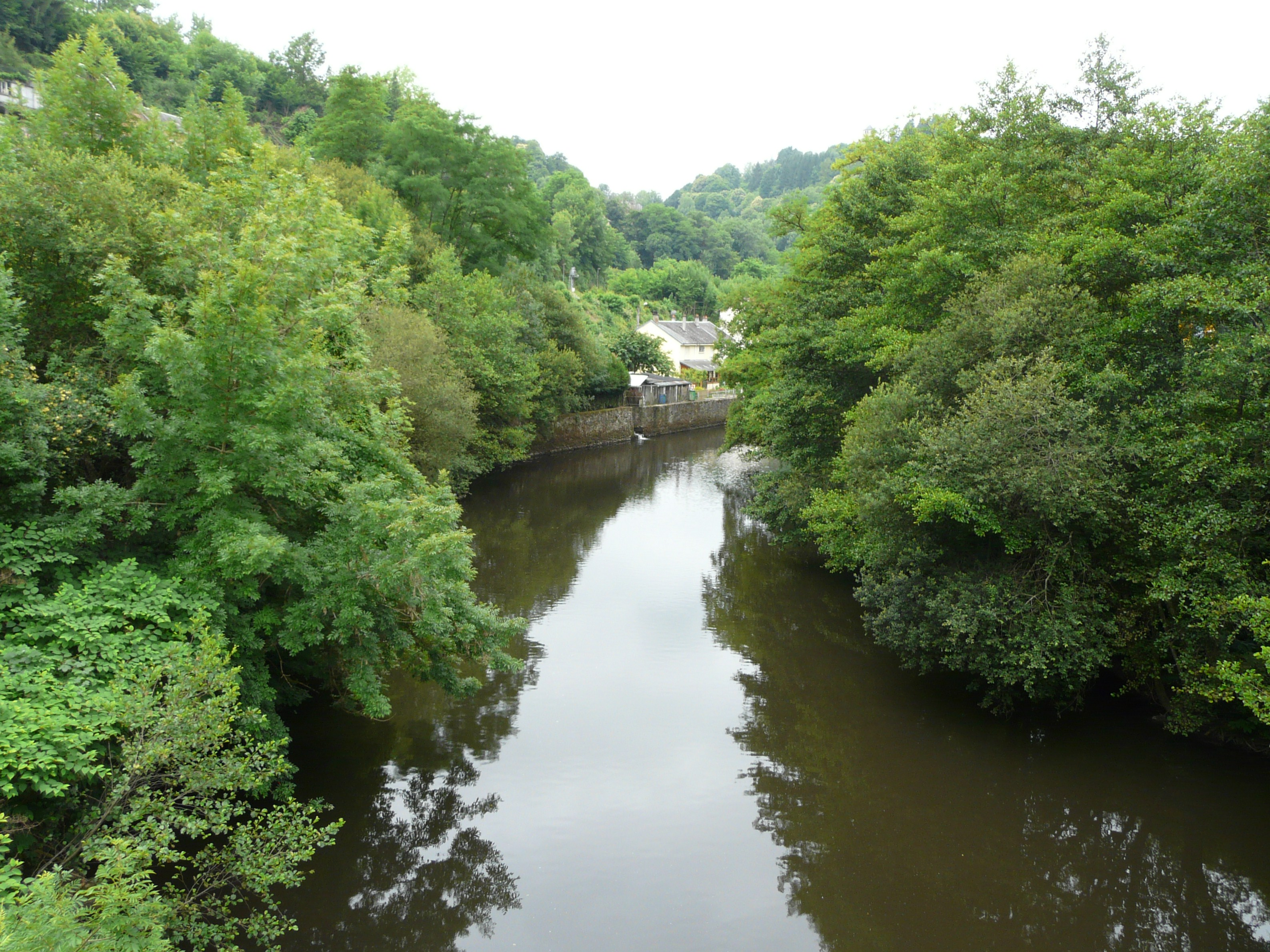 La Corrèze en aval du pont de Cornil, Corrèze, France.